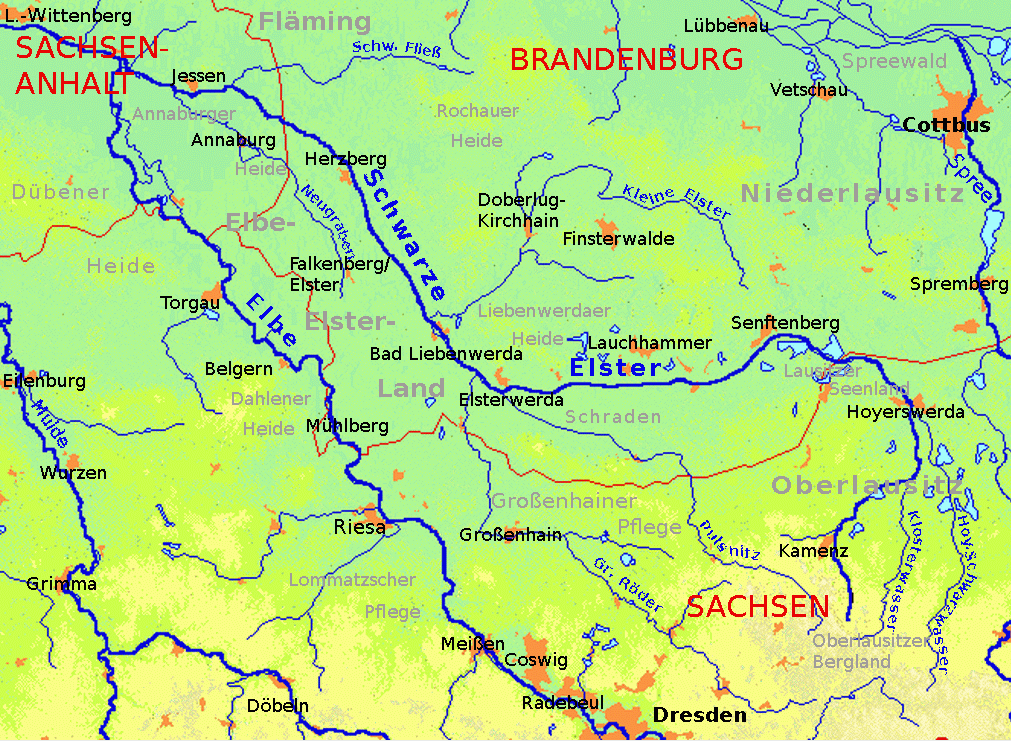 Flussystem der Schwarzen Elster